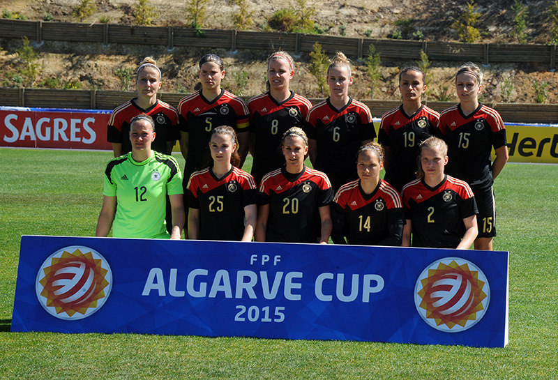 a_47_7344